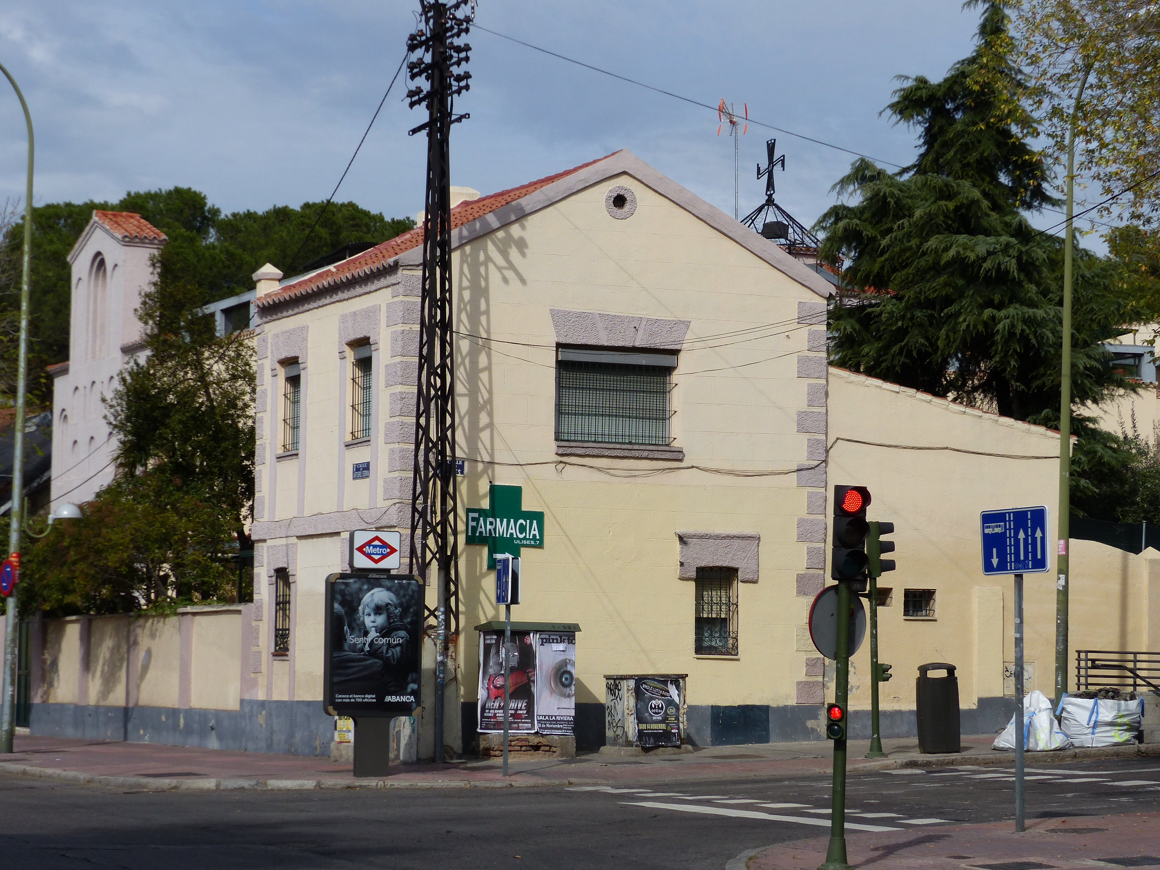 Una de las casas originales.